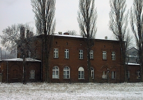 Wałbrzych, ul. Nowy Świat 5b - budynek d. dworca towarowego, 1853